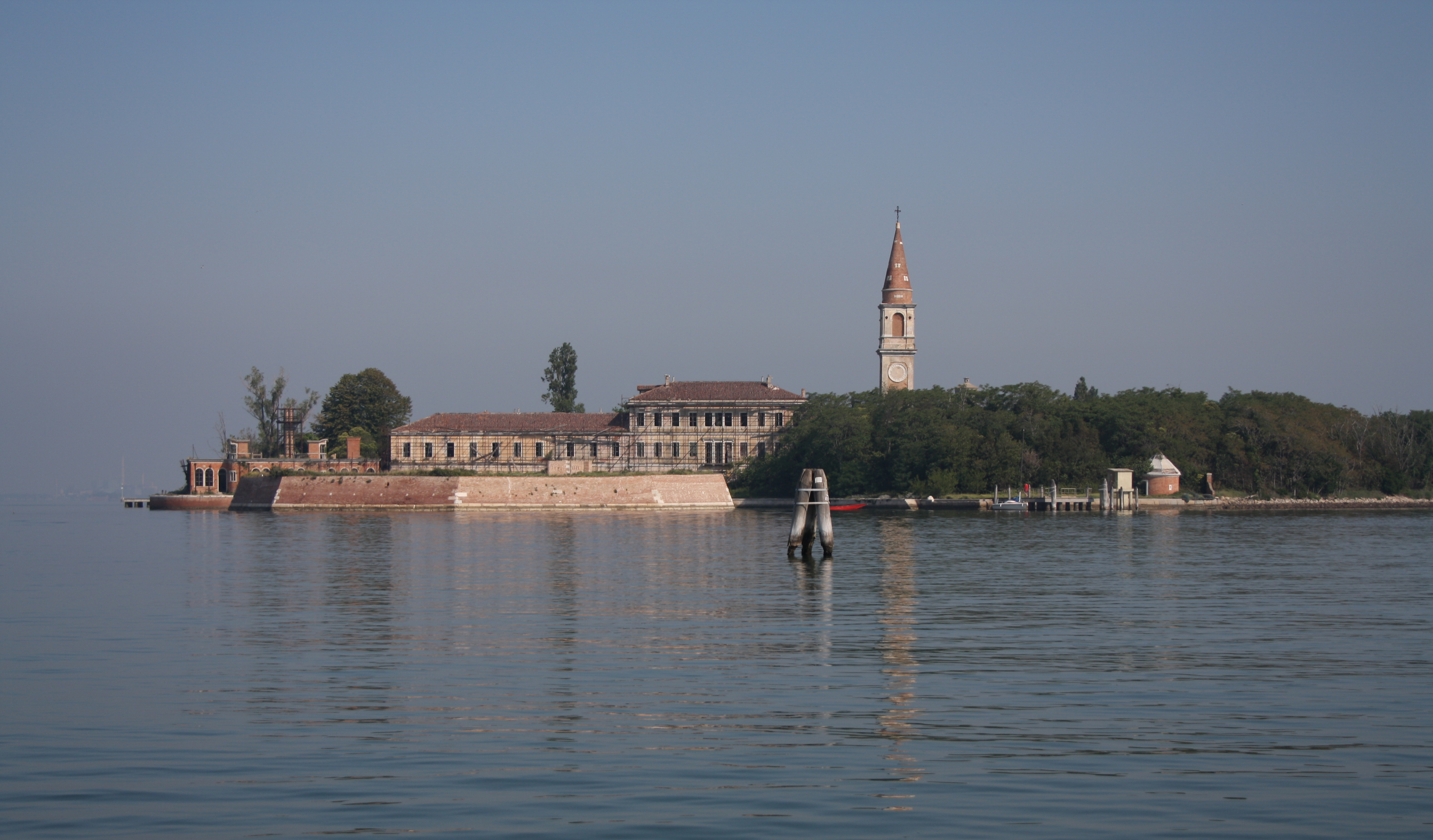 Isola di Poveglia, Laguna Sud Venezia